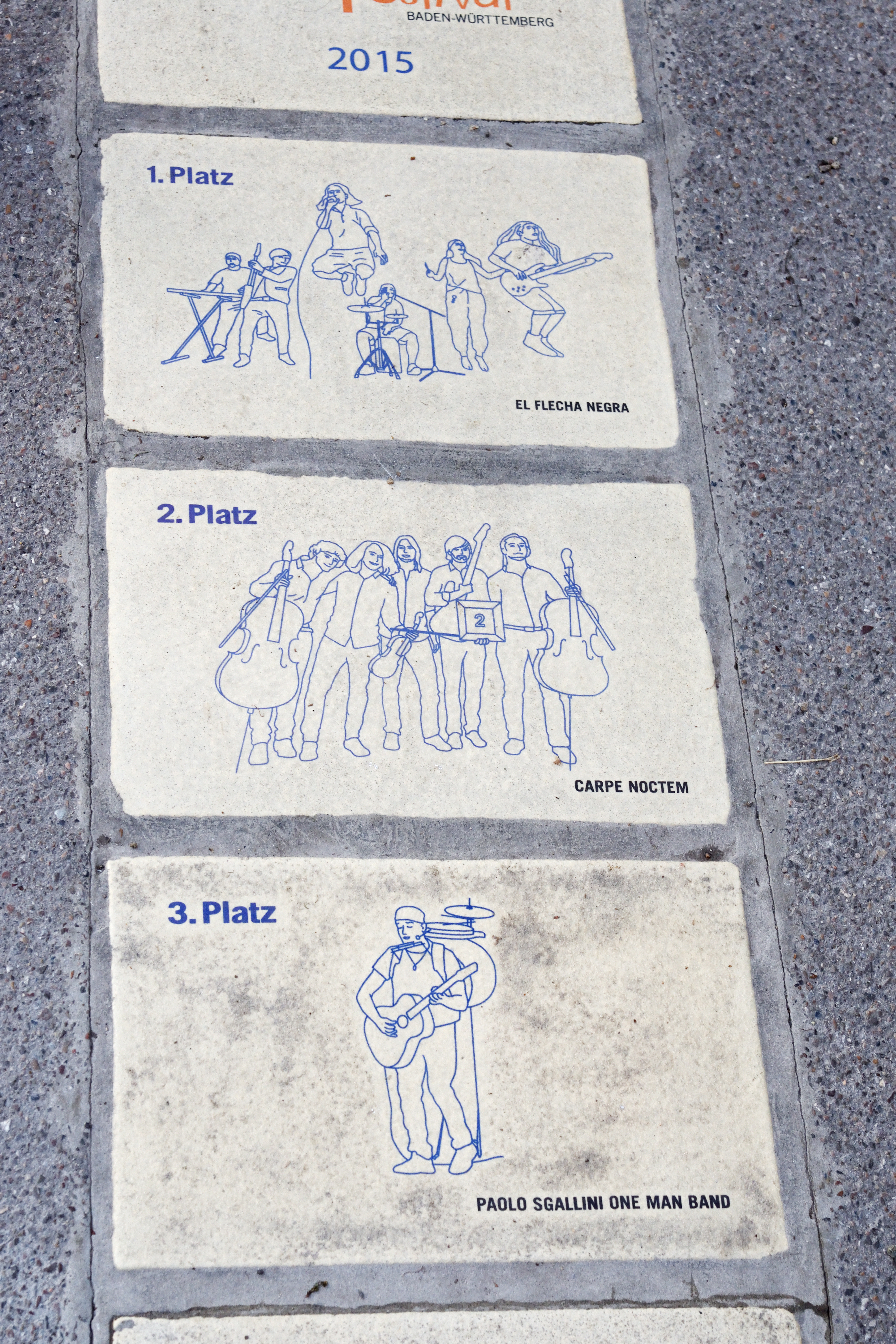 Straßenmusikfestival Baden-Württemberg, Abschnitt der Siegerliste